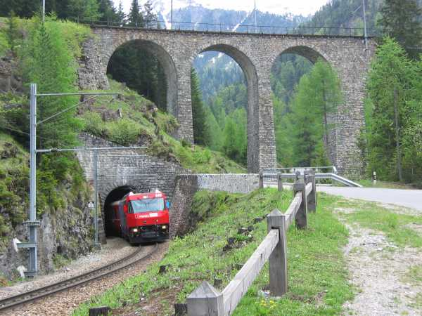 Streckenverlauf der Albulabahn von Preda nach Bergün.